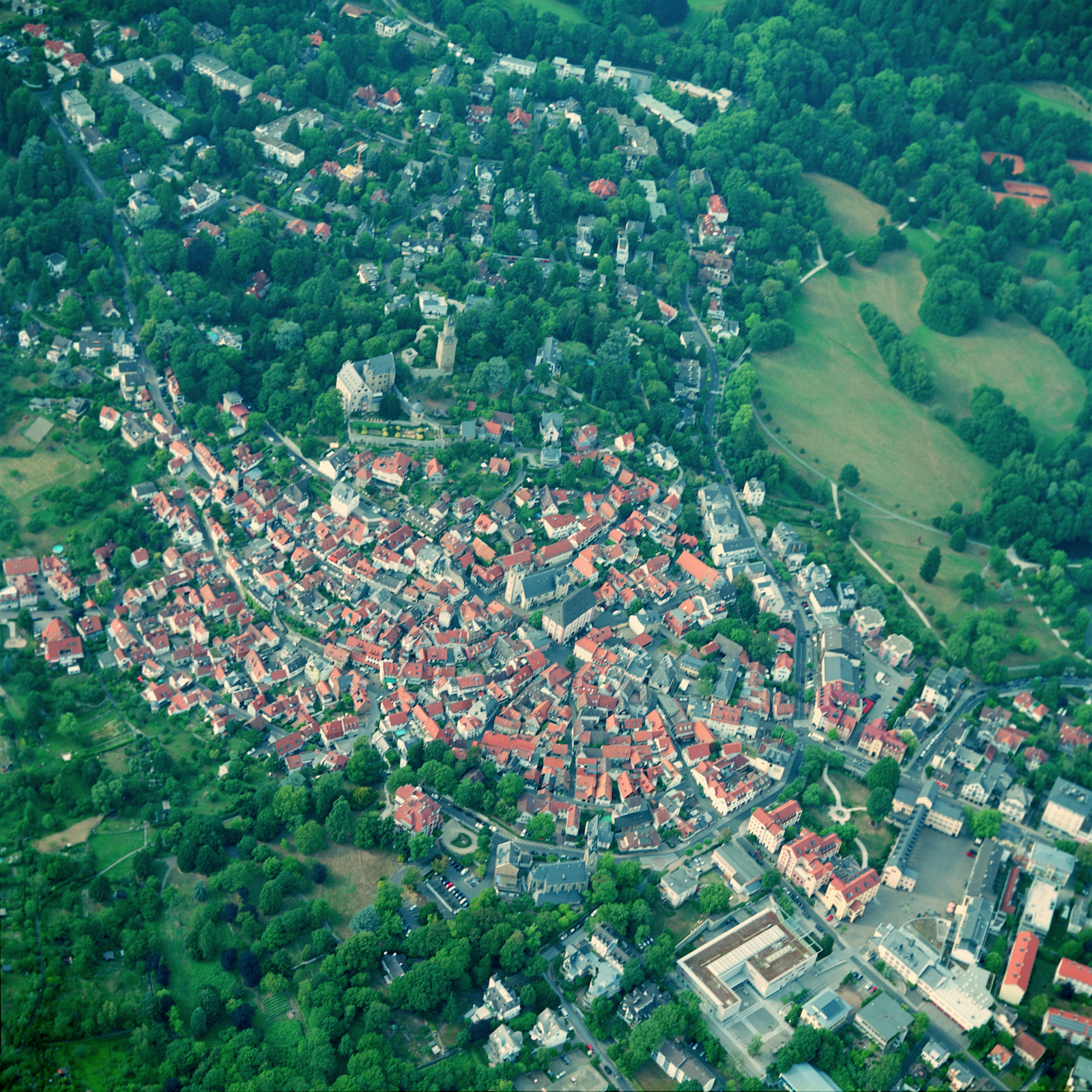 Luftaufnahme von Kronberg im Taunus. Im Vordergrund der Rathausgarten und der Berliner Platz, im Zentrum die Altstadt mit Burg, rechts der Viktoria-Park, Ansicht von Südwesten Bildaufnahmedatum: 24.07.2017, Flughöhe: ca. 900 m ü. NN